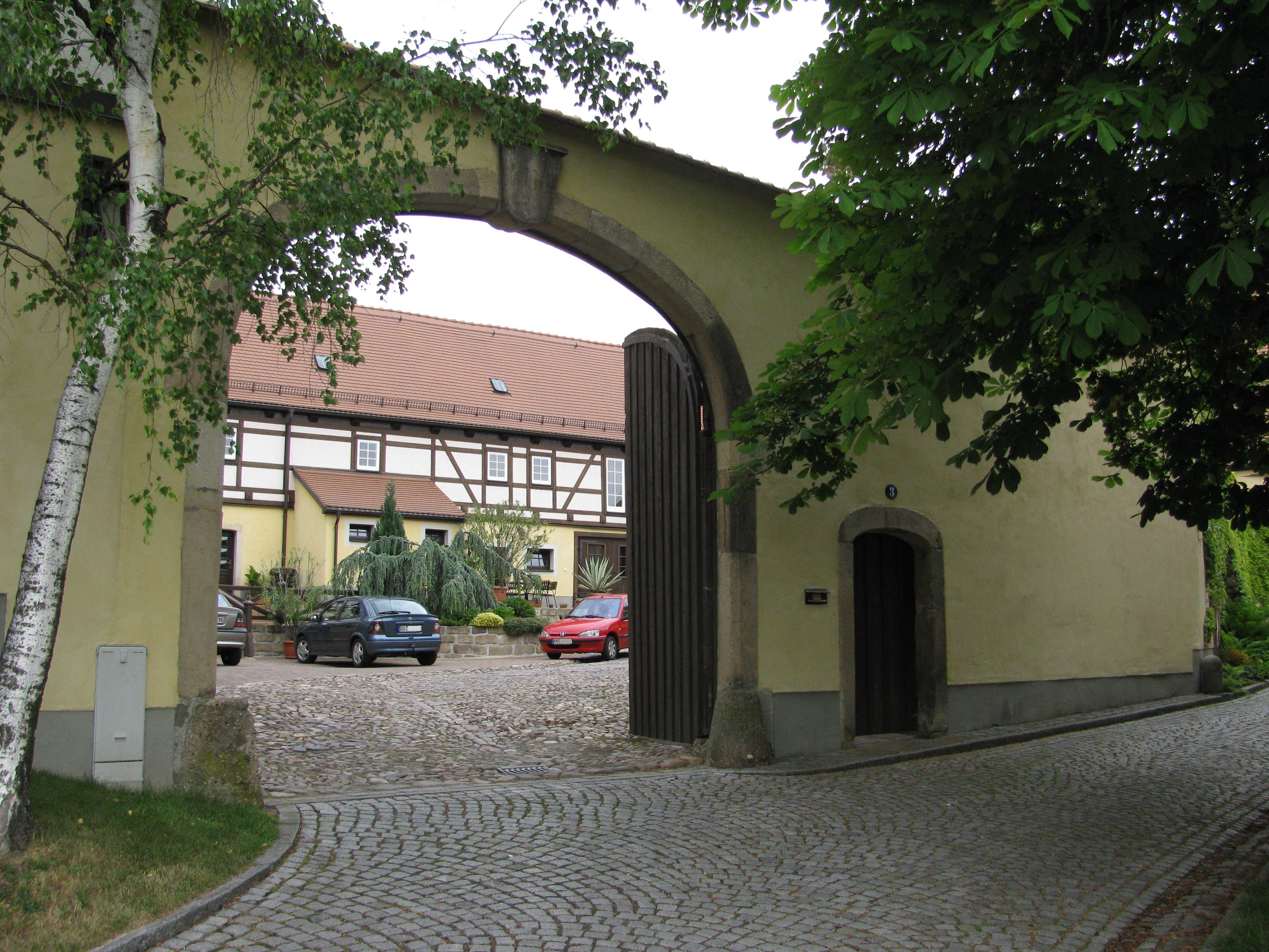 Gebäude im Dorfkern Altpestitz Nr. 3 in Kleinpestitz, Stadtteil von Dresden